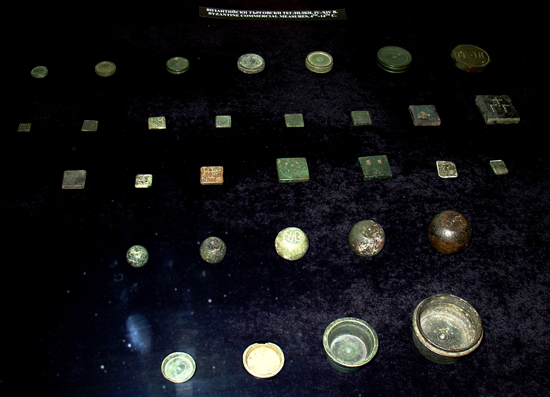 Poids et mesures d'époque byzantine (IVe - XIVe siècle). Musée archélogique de Varna (Bulgarie)